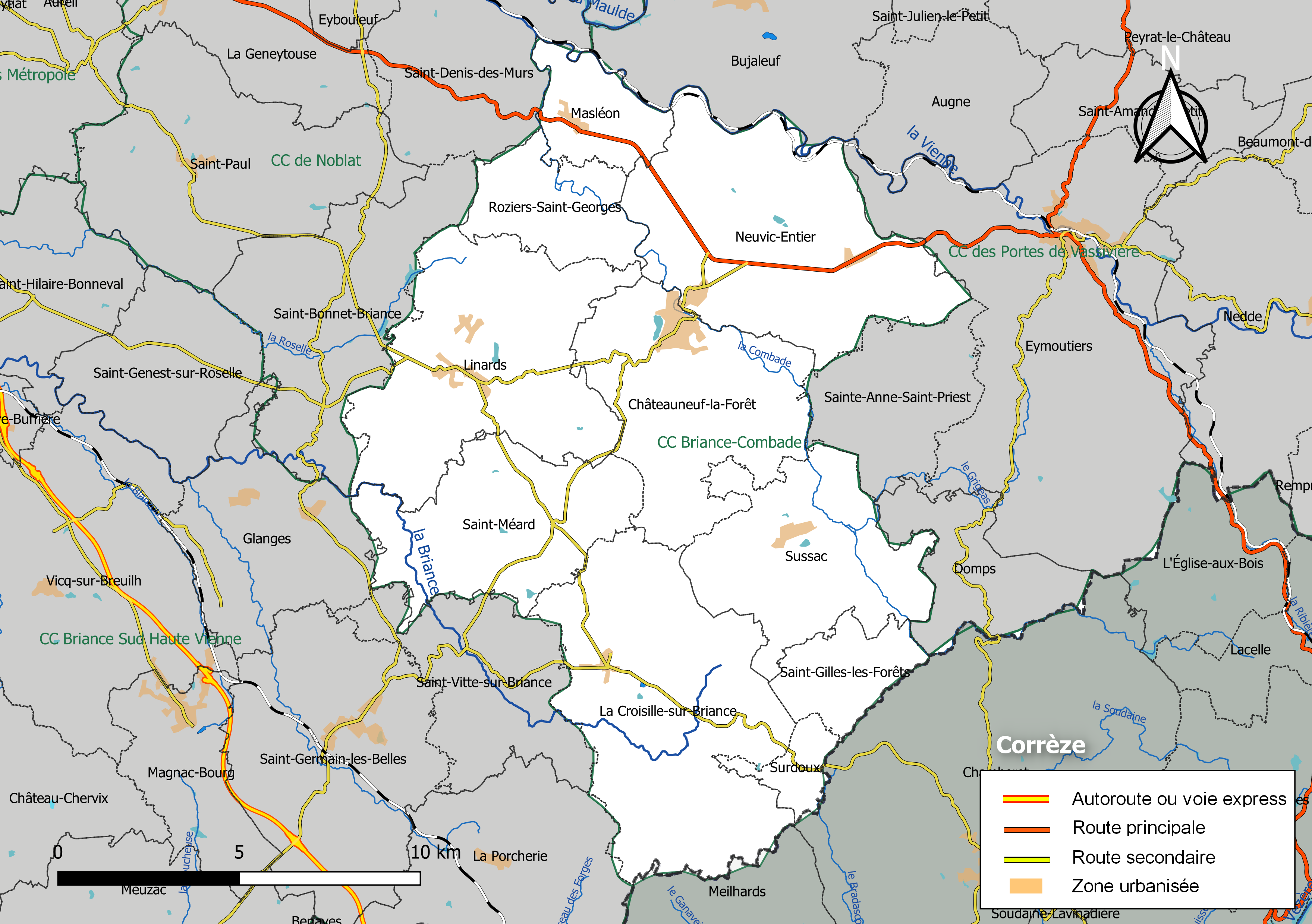 Carte géographique de la Communauté de communes Briance-Combade, département de la Haute-Vienne, France. Composition au 1er janvier 2019.